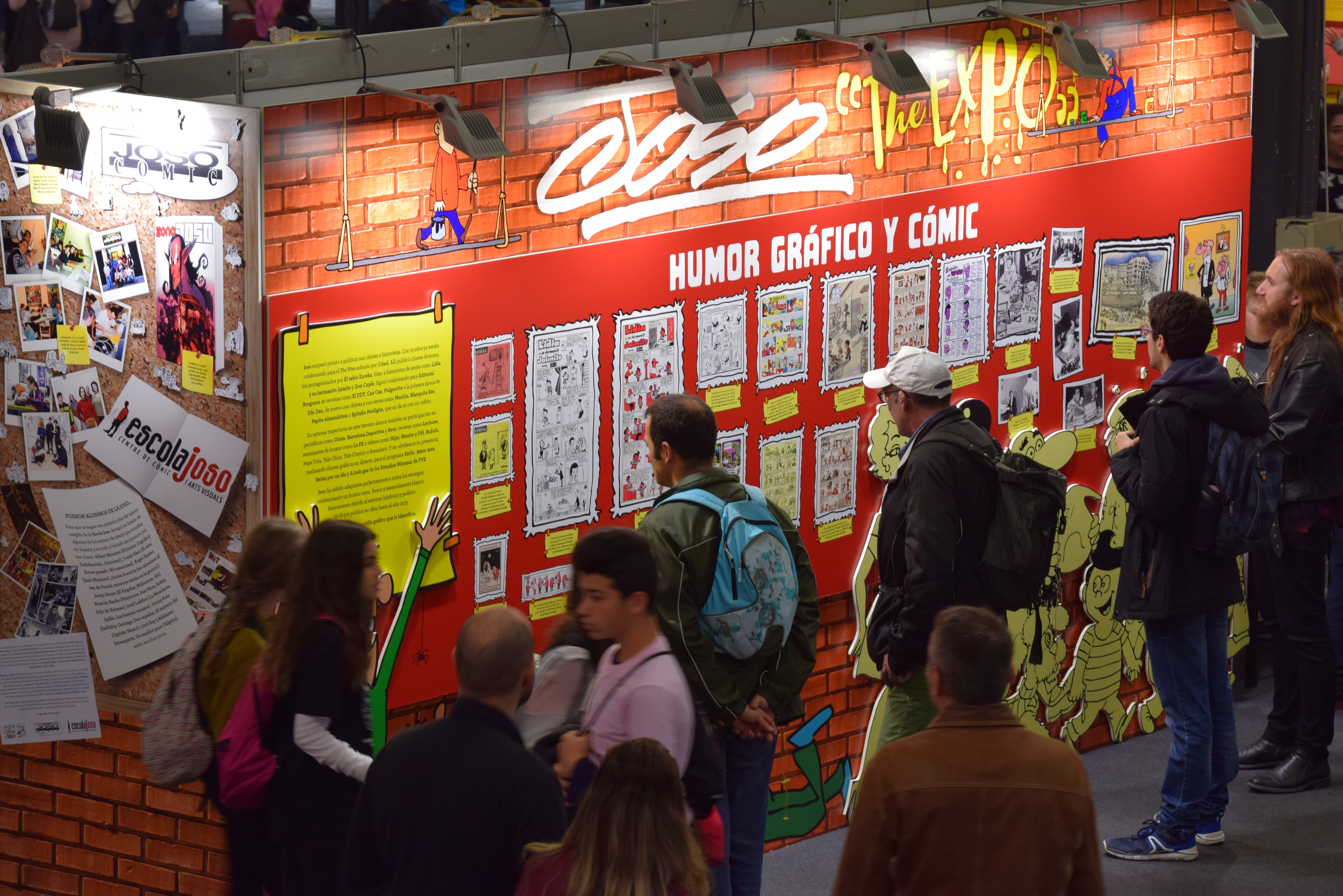 Exposició "Joso, The expo". Exposició en homenatge al 80è aniversari de l'humorista gràfic Josep Solana, conegut per Joso. 37 Comic Barcelona, 2019.